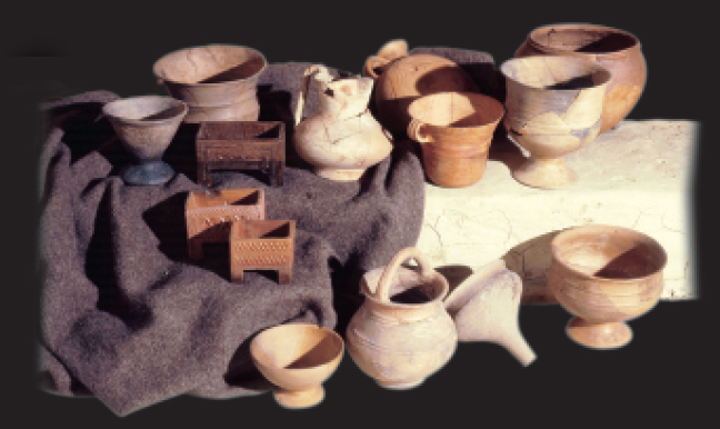 La Hoyako aztarnategiko zeramikak